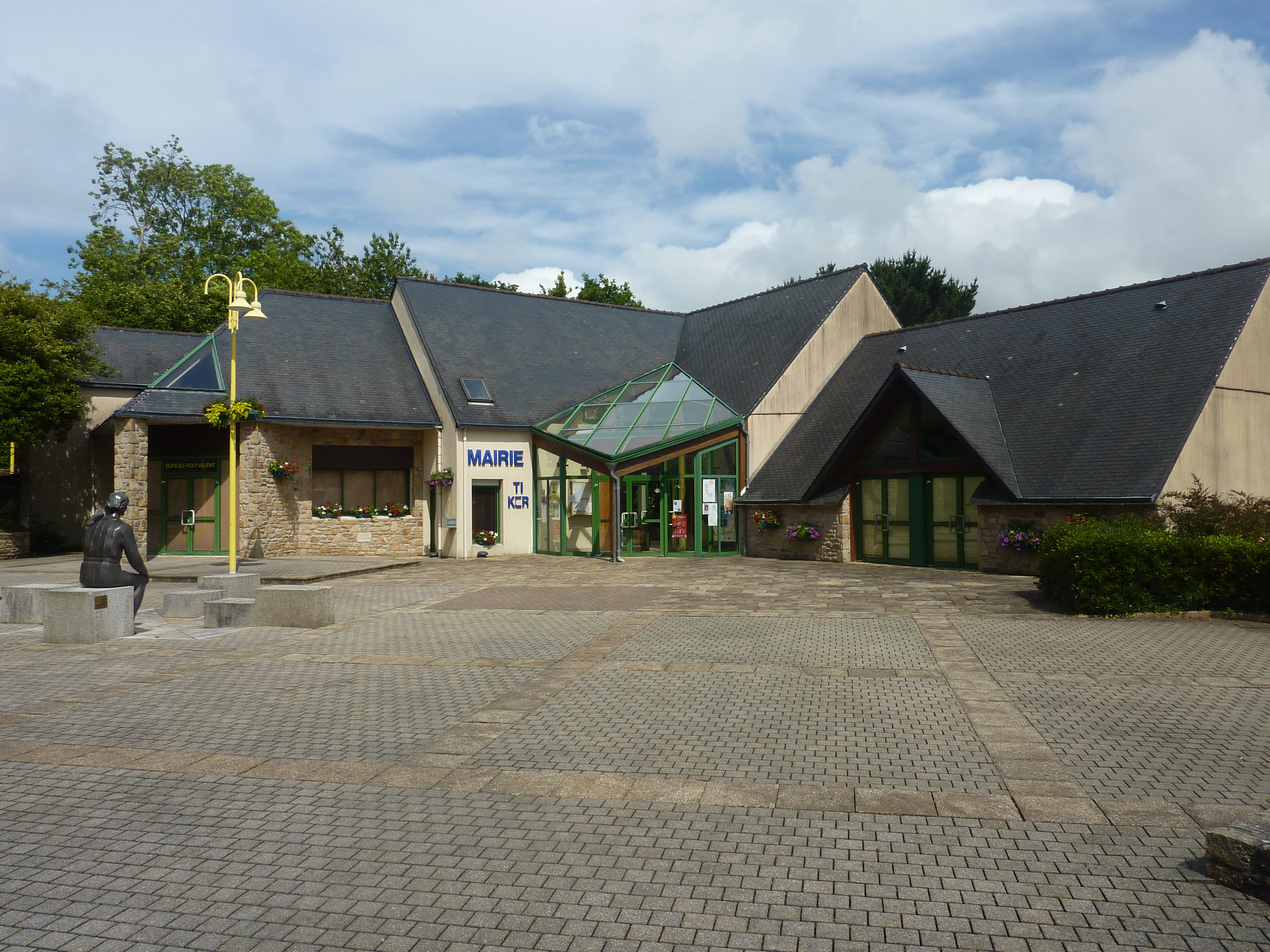 La Forest-Landerneau : la mairie